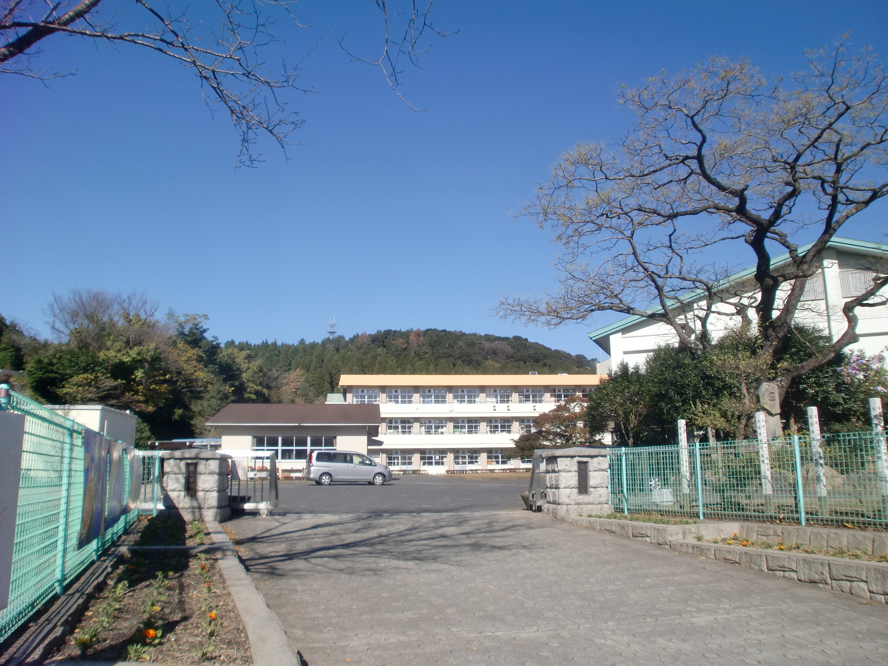 鹿児島市立錫山小中学校の外観。